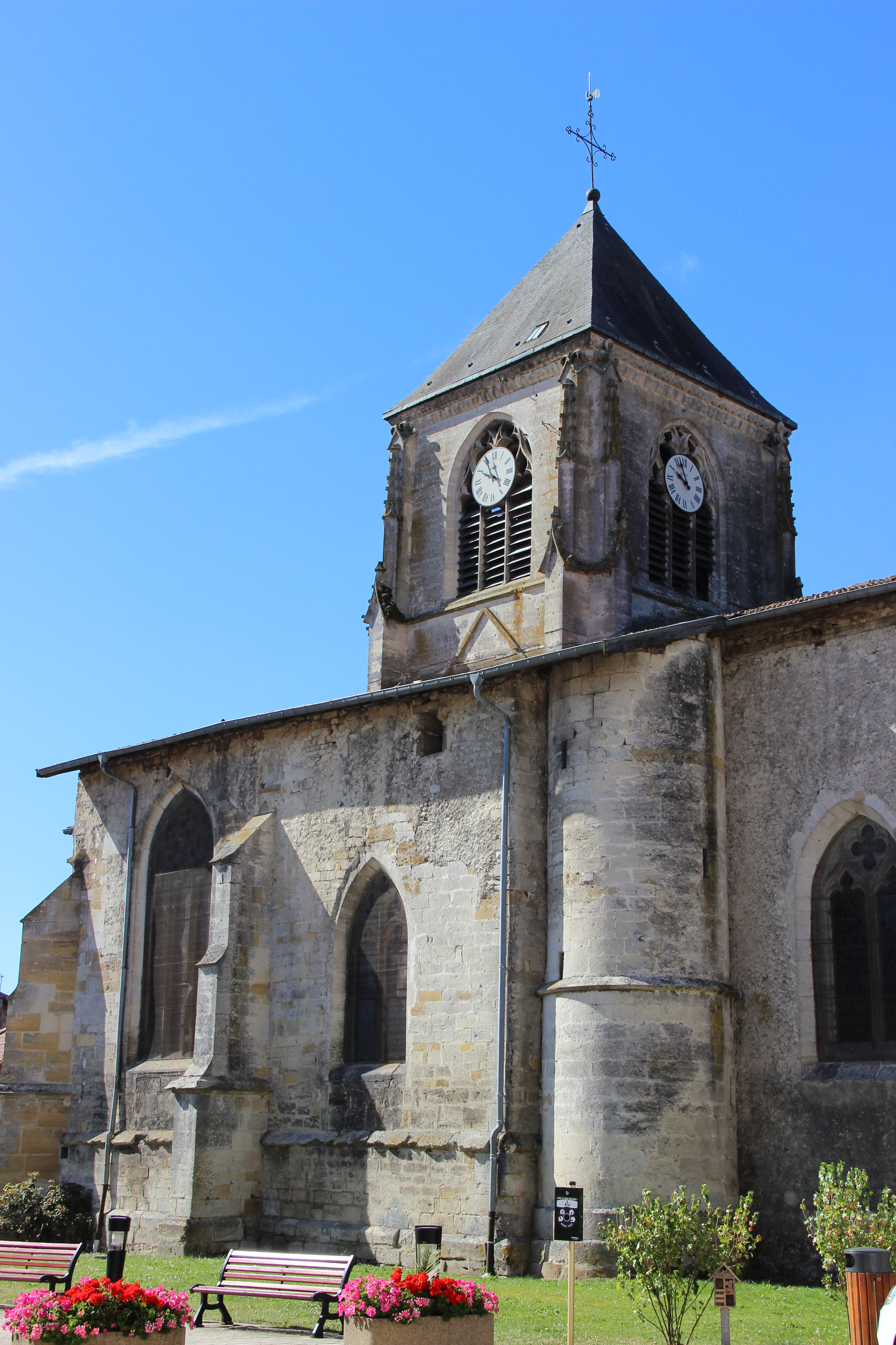 Eglise Saint-Hilaire - Longeville-en-Barrois